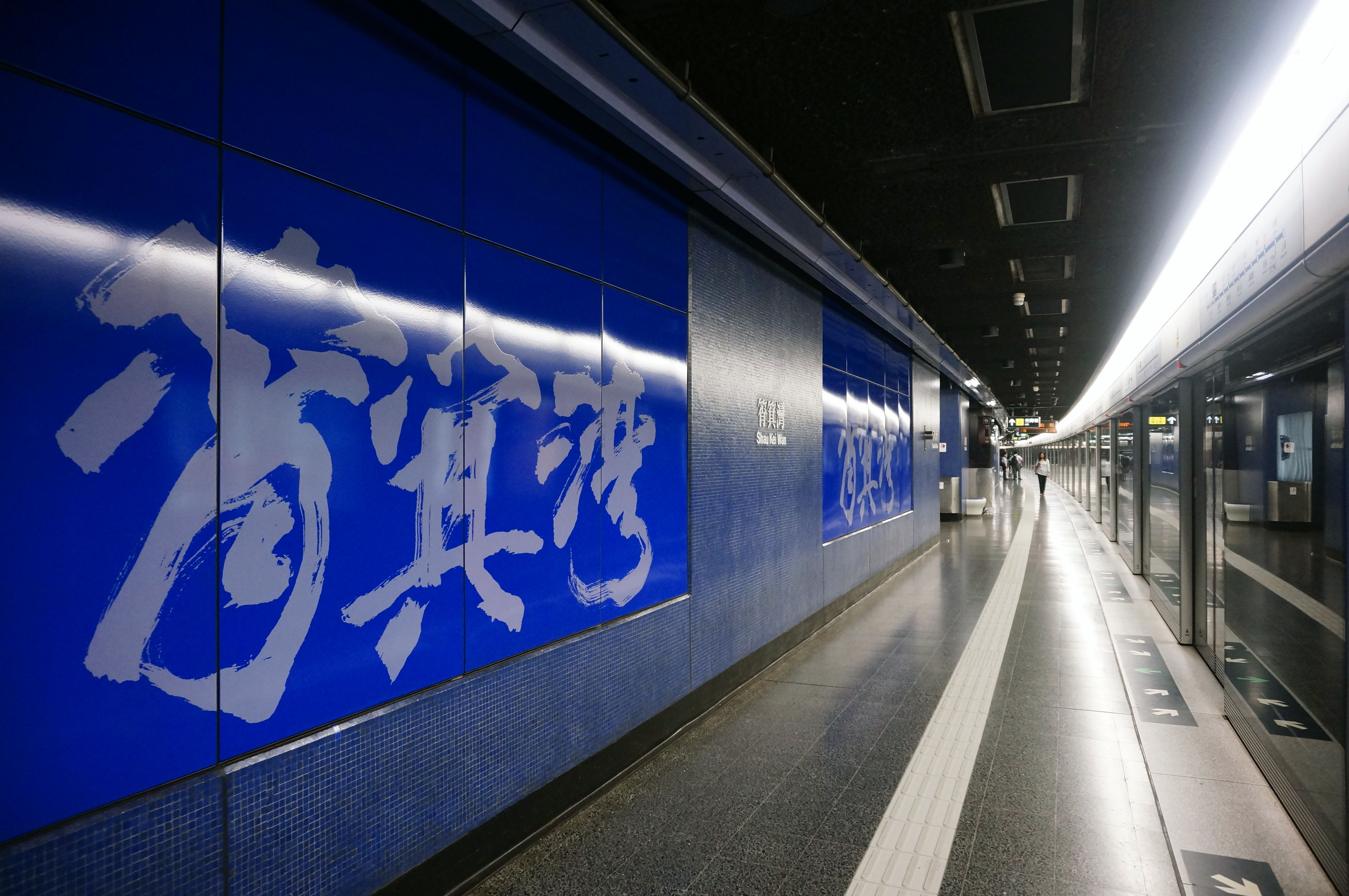 港鐵筲箕灣站月台